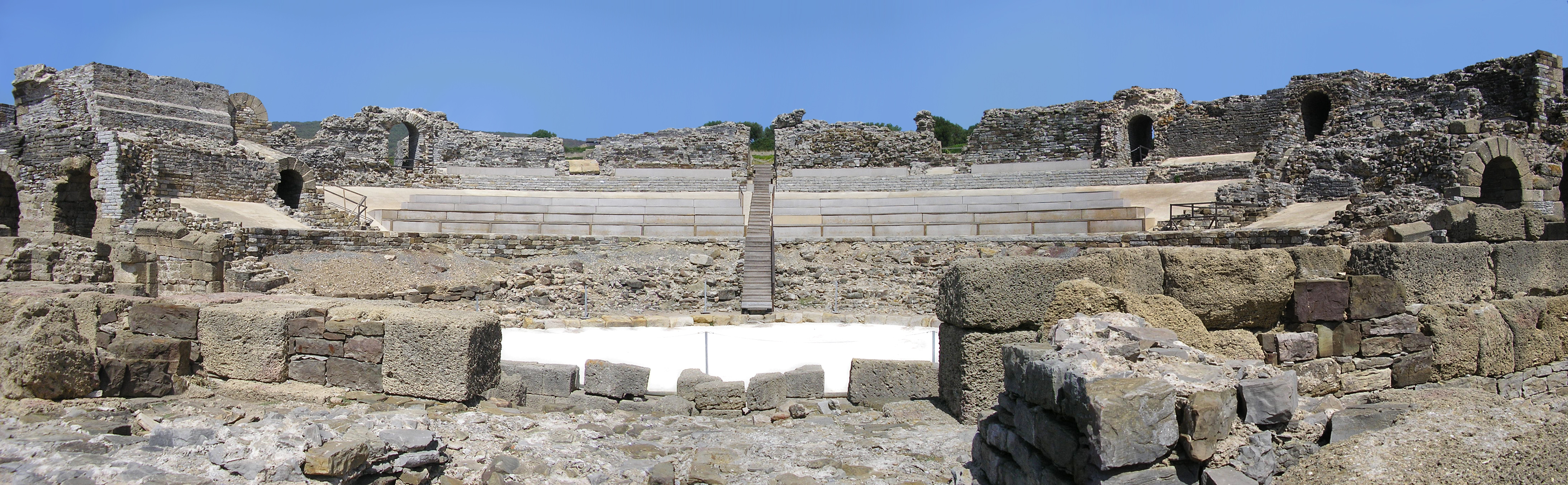 Vista panorámica del Teatro de la ciudad de Baelo Claudia, Tarifa, Andalucía, España. El último término el graderío (Cavea) y en sus extremos los vomitorios. En el centro la Orchestra y en primer plano el frontal de la Escena (Scaenae) y estructuras asociadas a ella (Postscaenium).